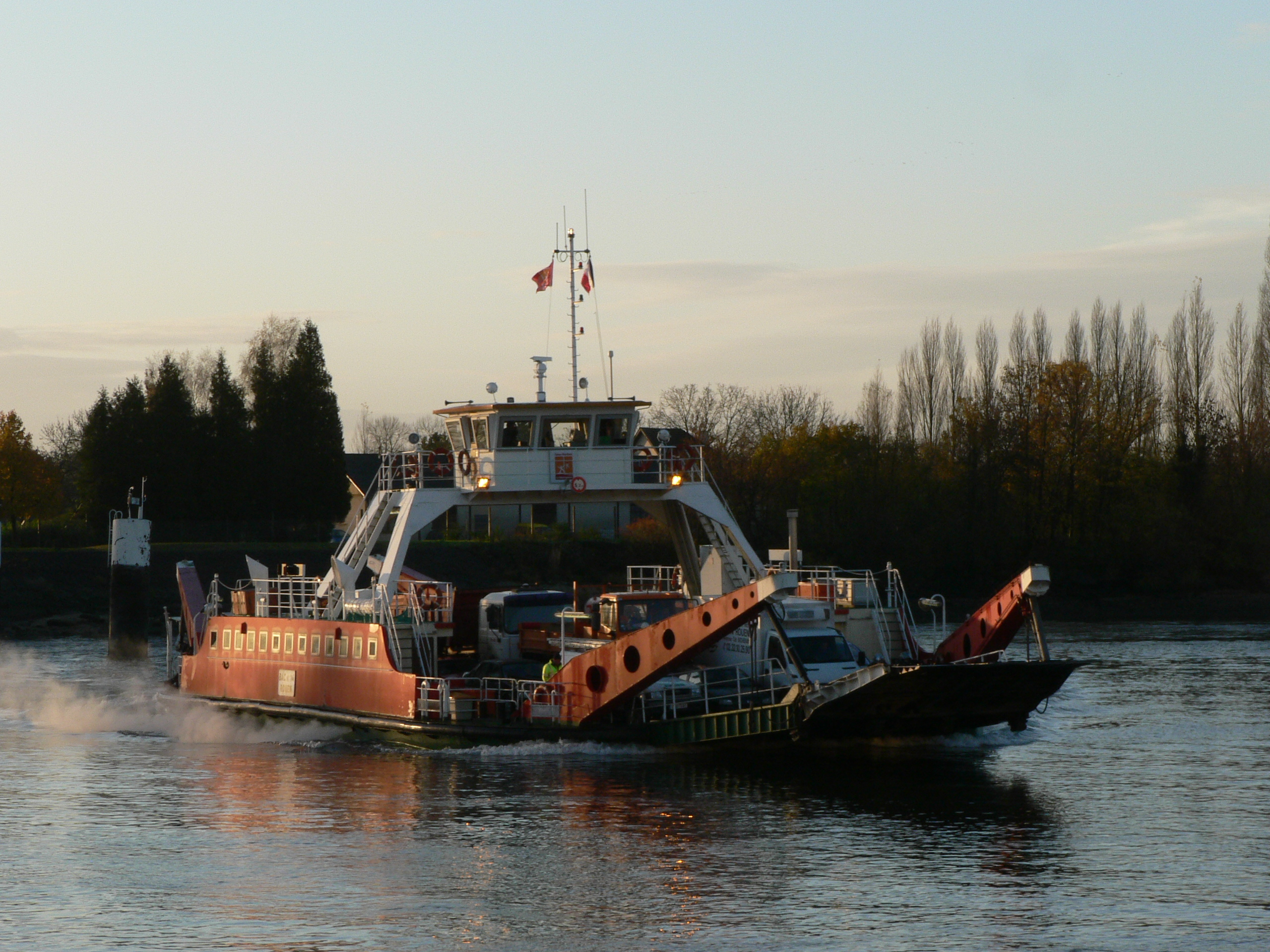 Bac 14 (MMSI 227471540) à Duclair.